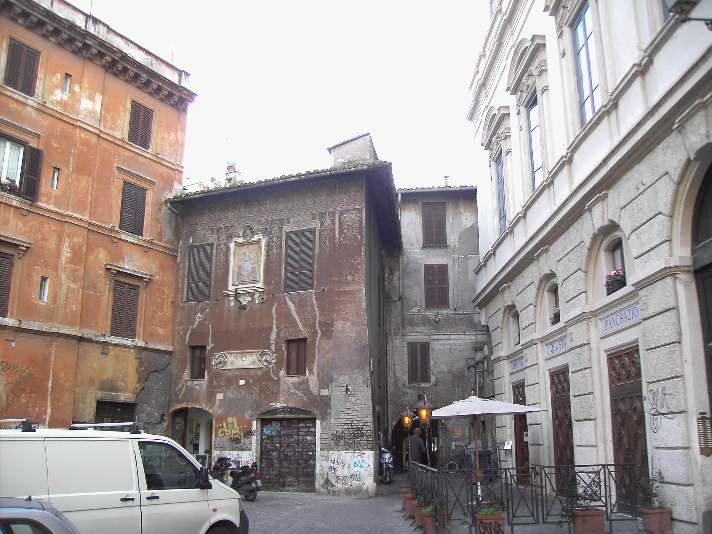 Roma, piazza del Biscione (dietro Campo de' Fiori). L'edificio istoriato è detto "stalla degli Orsini".